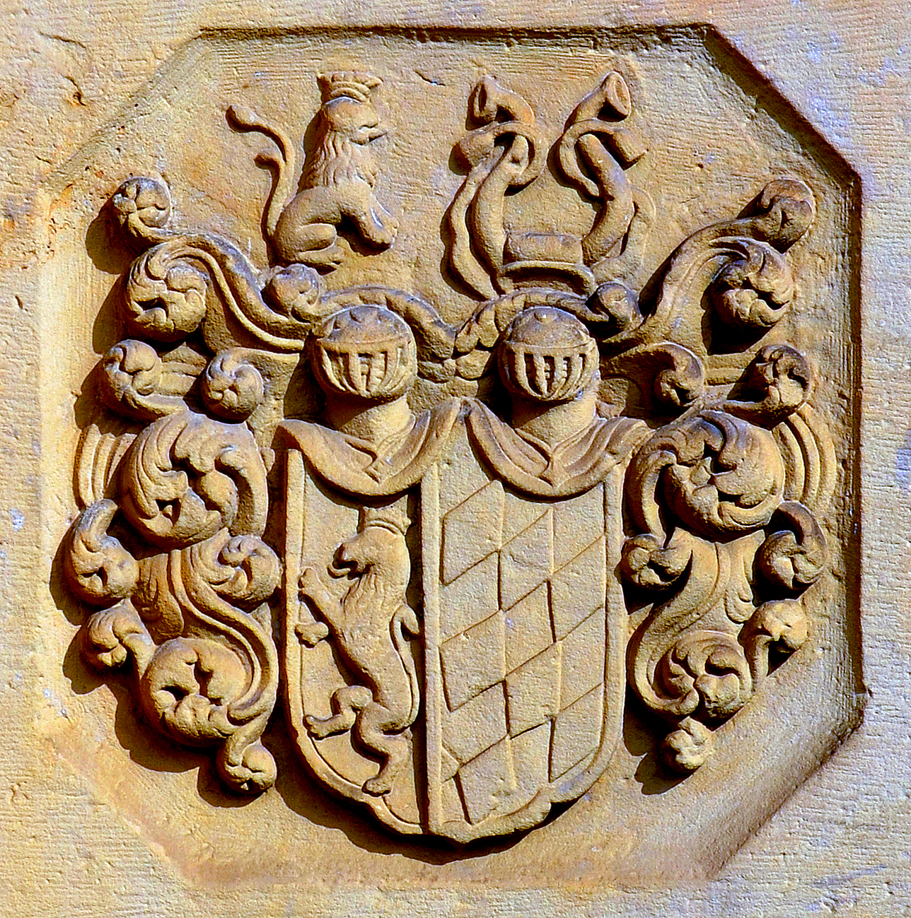 Wappen des Karl Moritz Raugraf zu Pfalz in dessen Epitaph an der Aussenwand der Neustädter Hof- und Stadtkirche St. Johannis in Hannover im heutigen Stadtteil Calenberger Neustadt ...